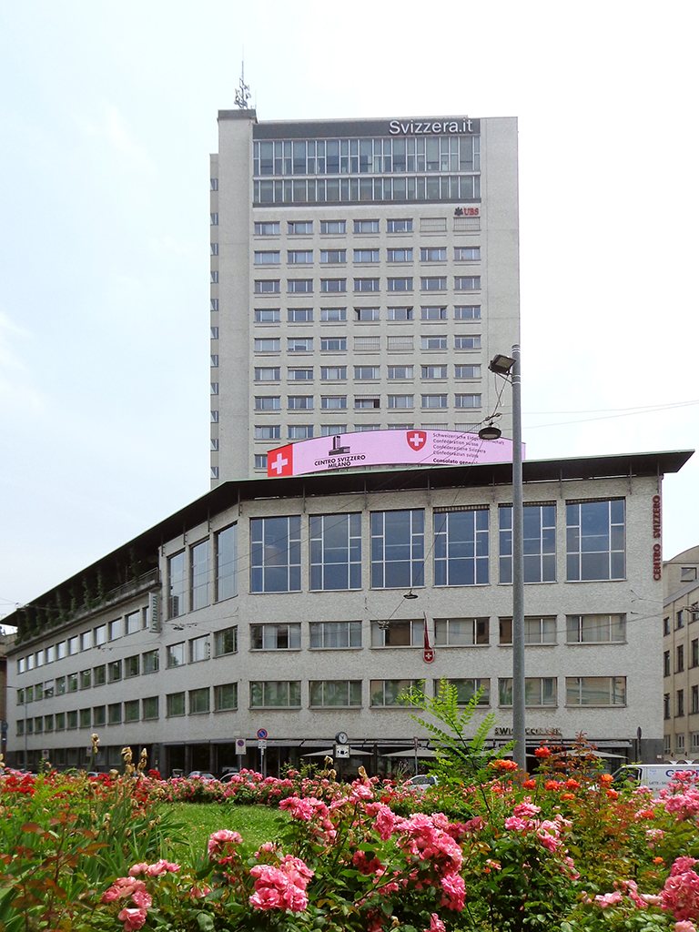 Il Centro Svizzero in piazza Cavour a Milano.